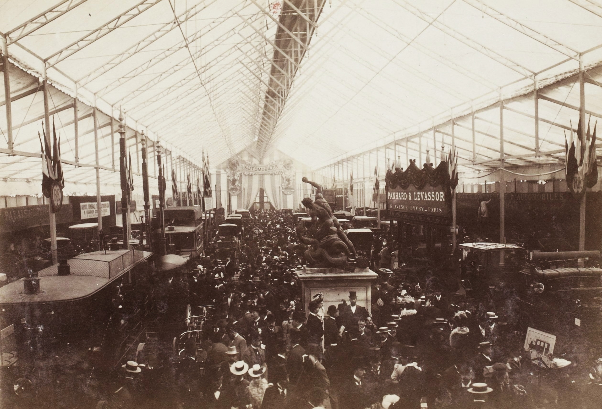 [Collection Jules Beau. Photographie sportive] : T. 7. Année 1898 / Jules Beau : F. 14. [Exposition de l'Automobile Club de France, Tuileries, 15 juin 1898]